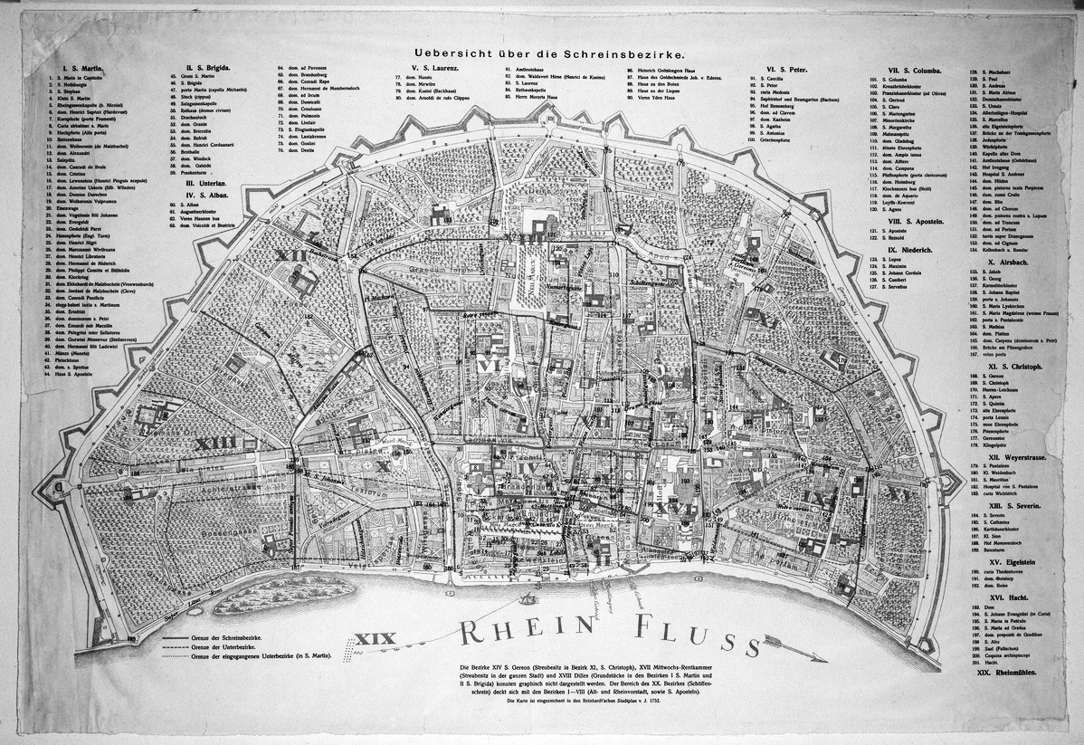 Kupferstich: Stadtplan Reinhardt (1752)